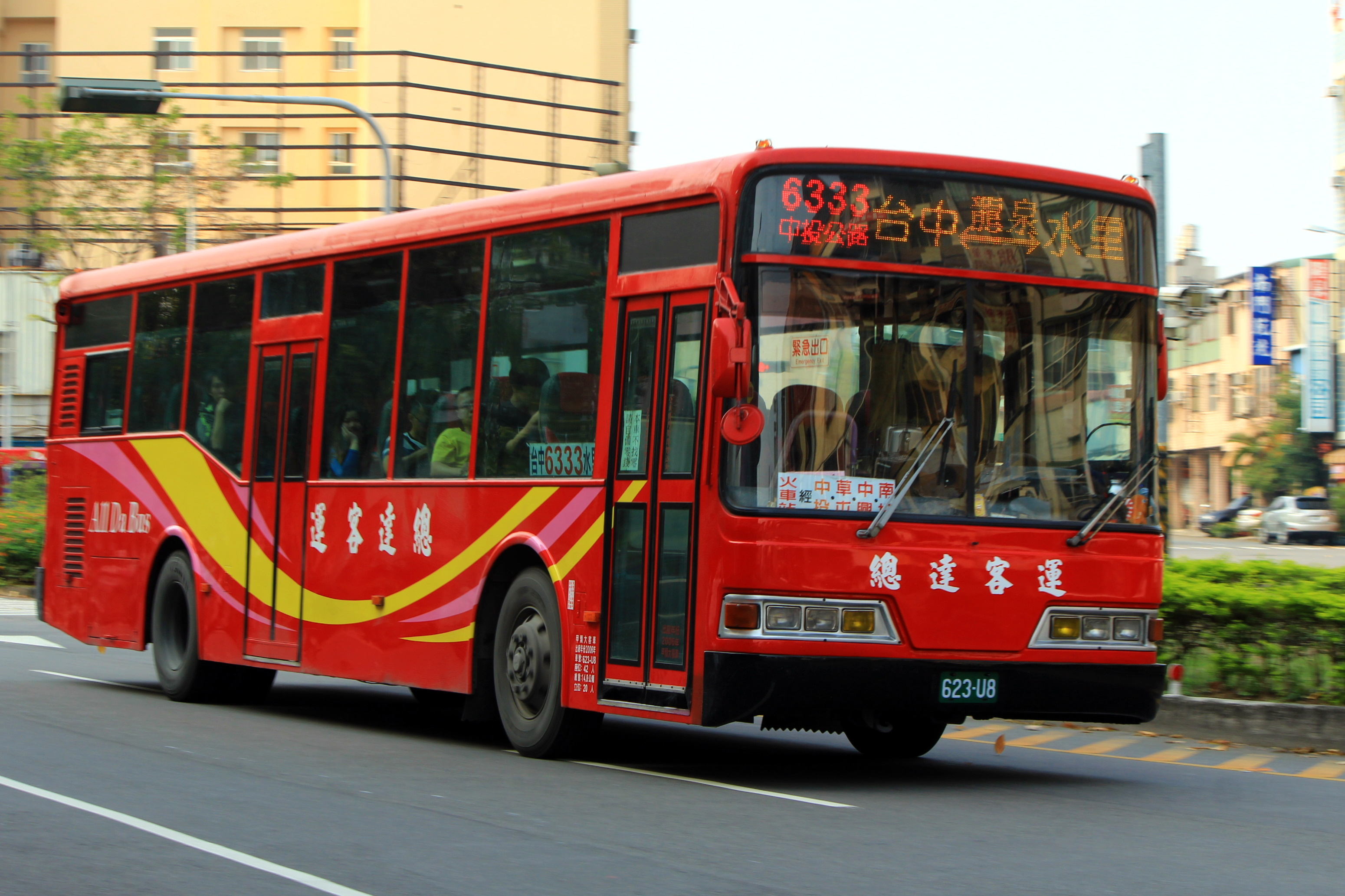 2006〈2014〉 FUSO RM117NL